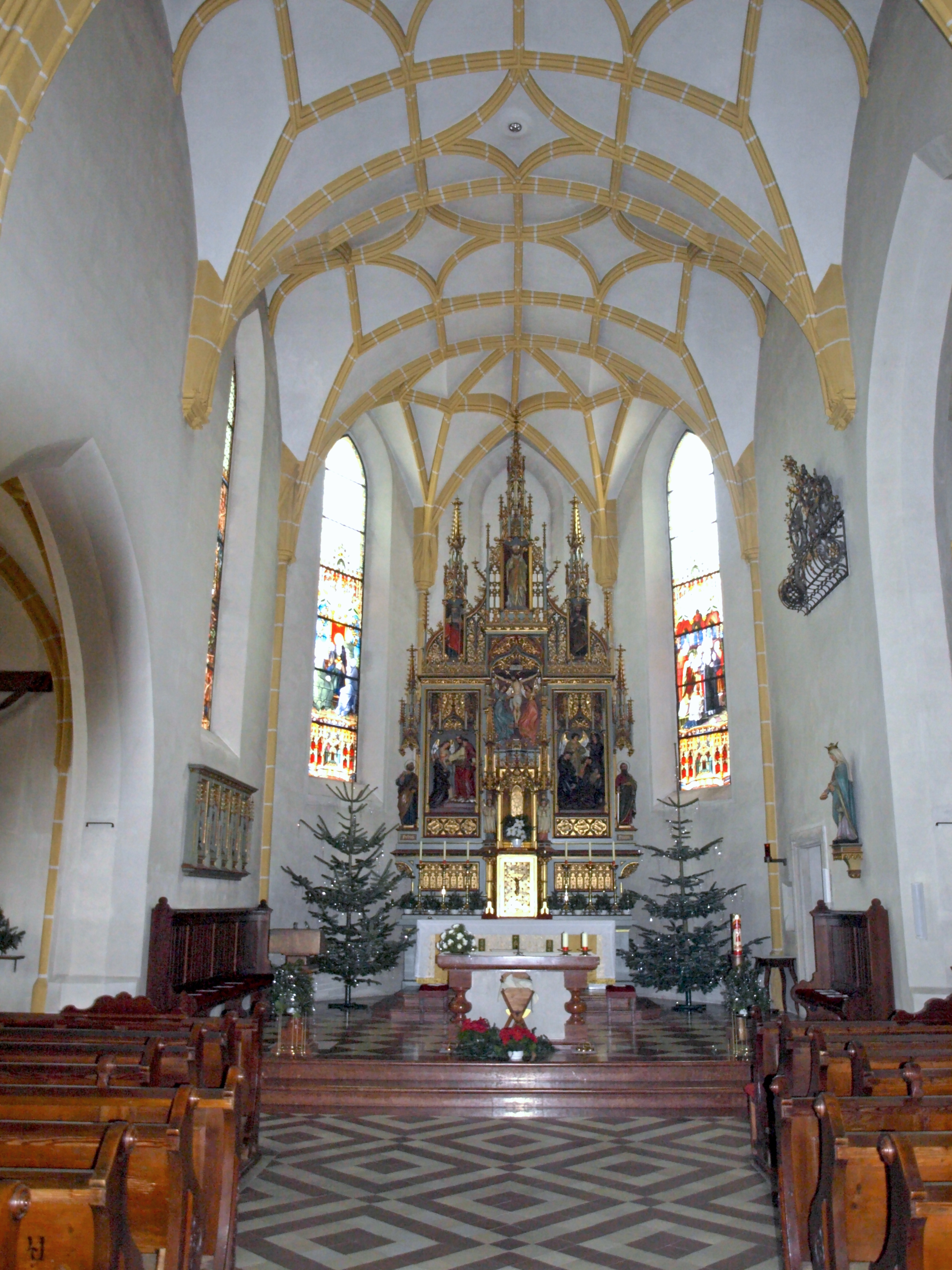 Kath. Pfarrkirche hl. Martin